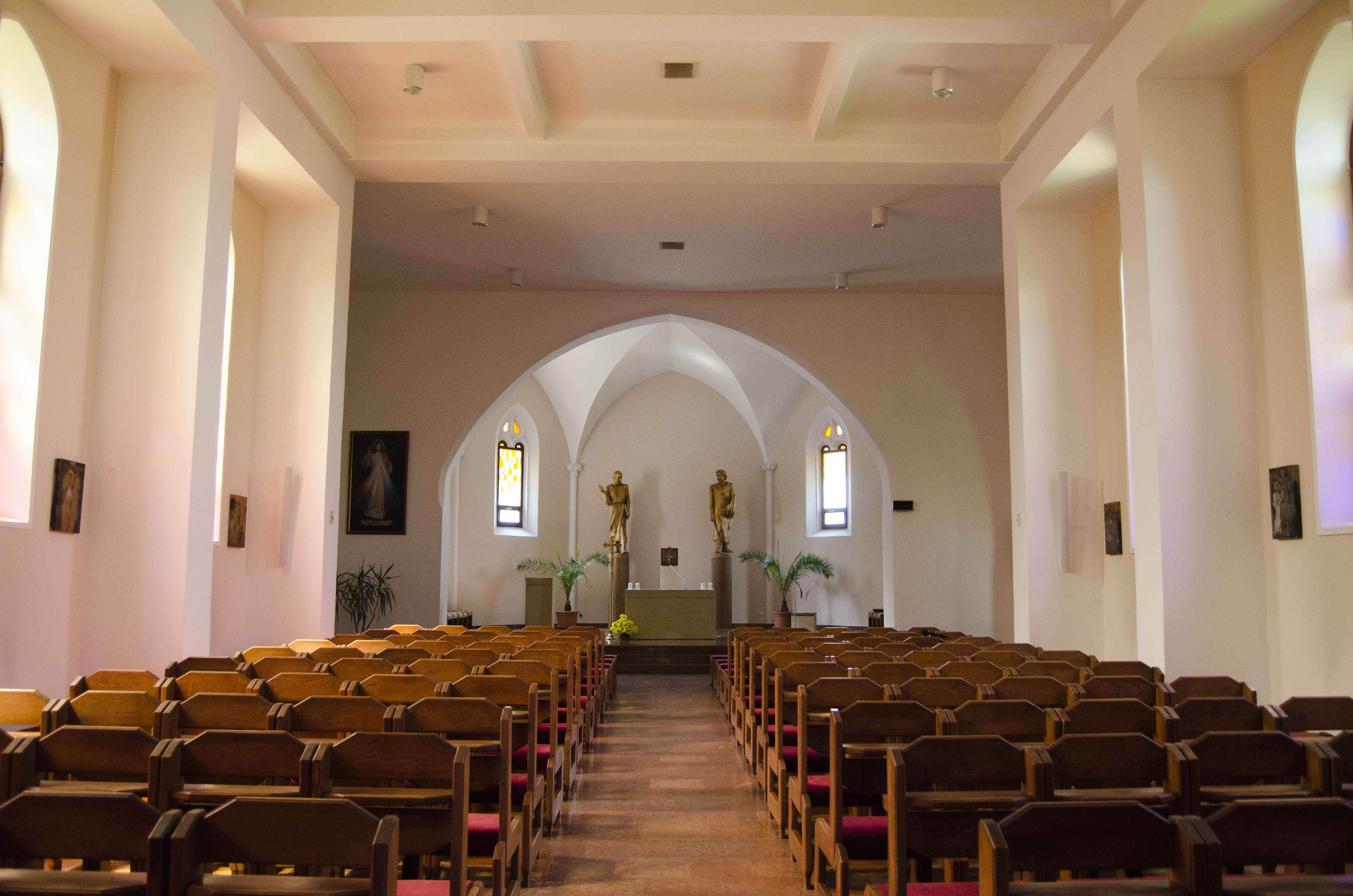 Kostol sv. Petra a Pavla v Barci_interiér 2019